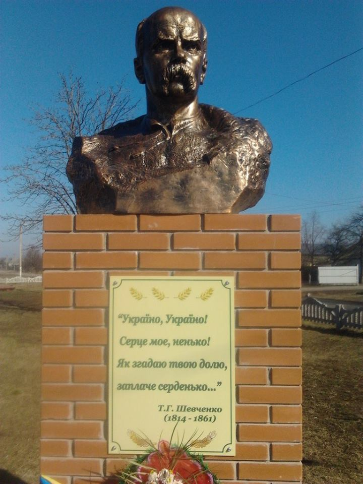 Пам'ятник Т.Шевченку, встановлений у с. Личковому Магдалинівського р-ну, Дніпропетровської обл.